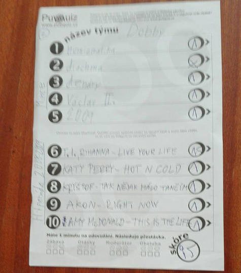 Vyhodnocené odpovědi moderátorem na soutěžním večeru Pub Quiz